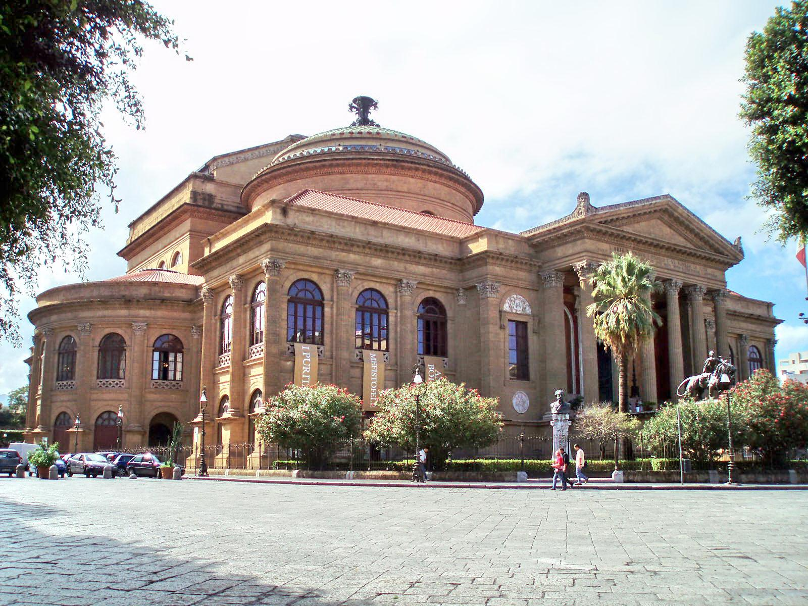 Palermo Opera house